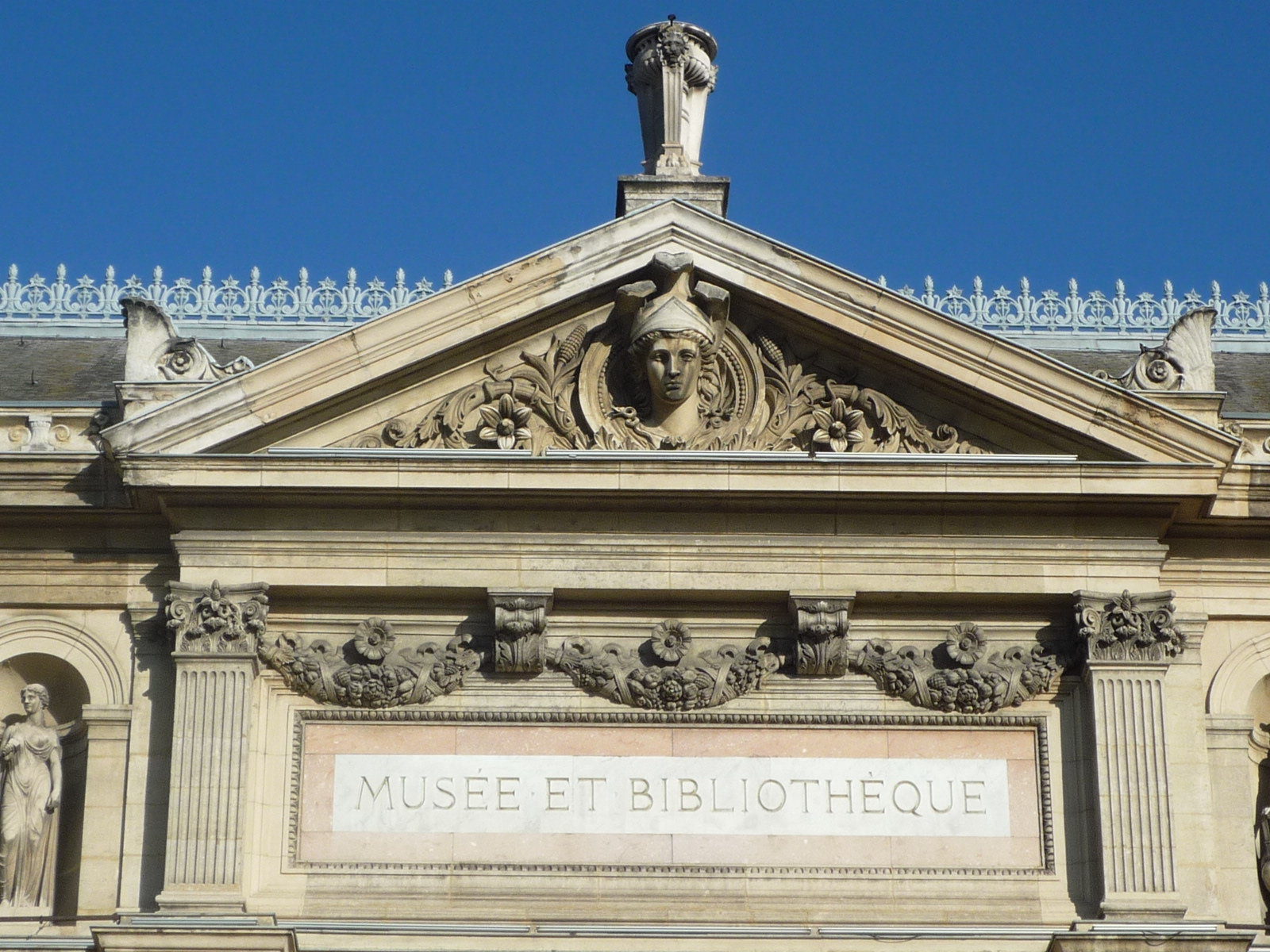 Fronton du musée-bibliothèque de Grenoble (1872)